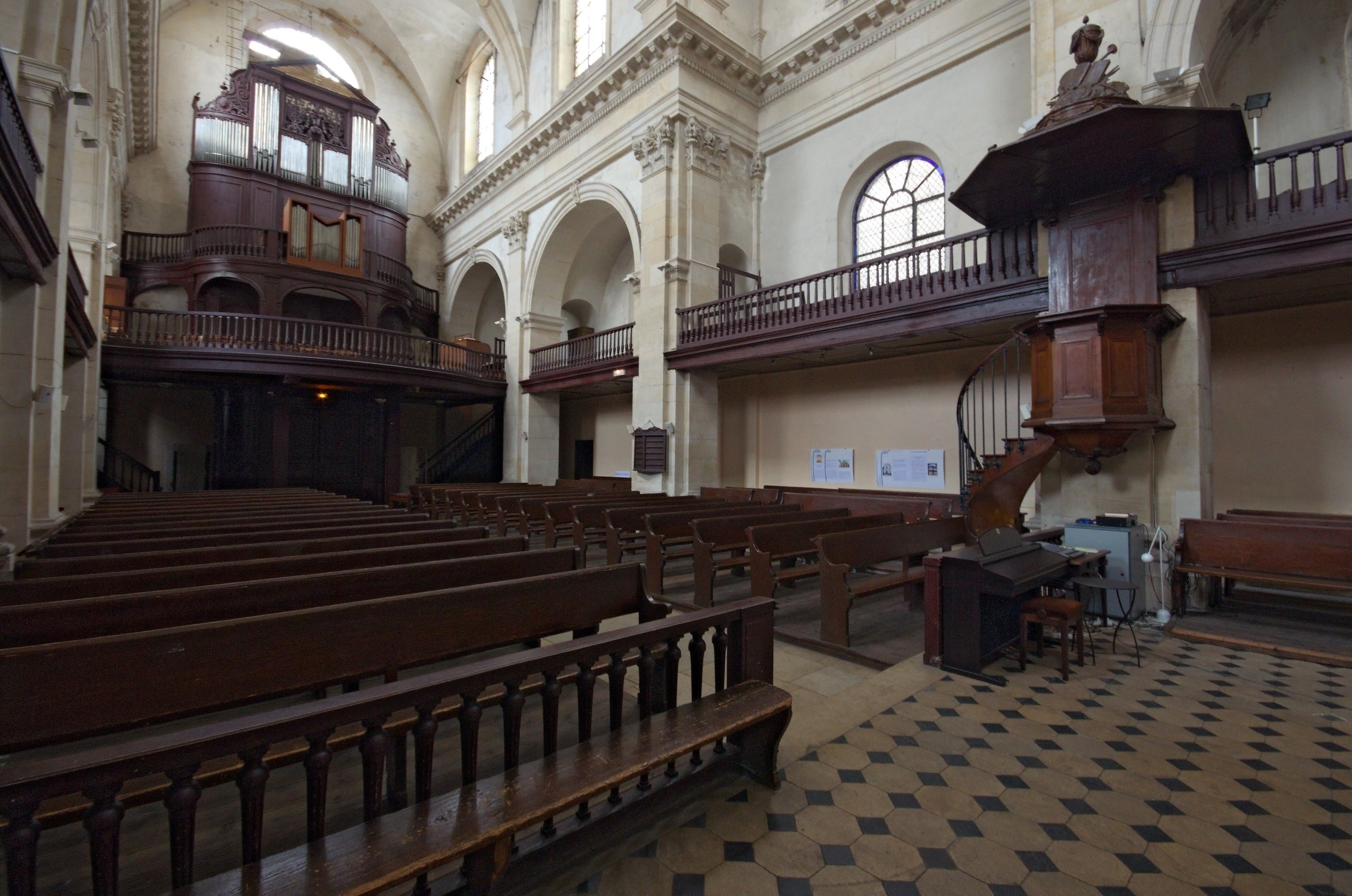 Vue intérieure de l'abbaye Saint-Joseph de Nancy, affectée au culte protestant et devenue le temple protestant de Nancy ou temple Saint-Jean en 1807.